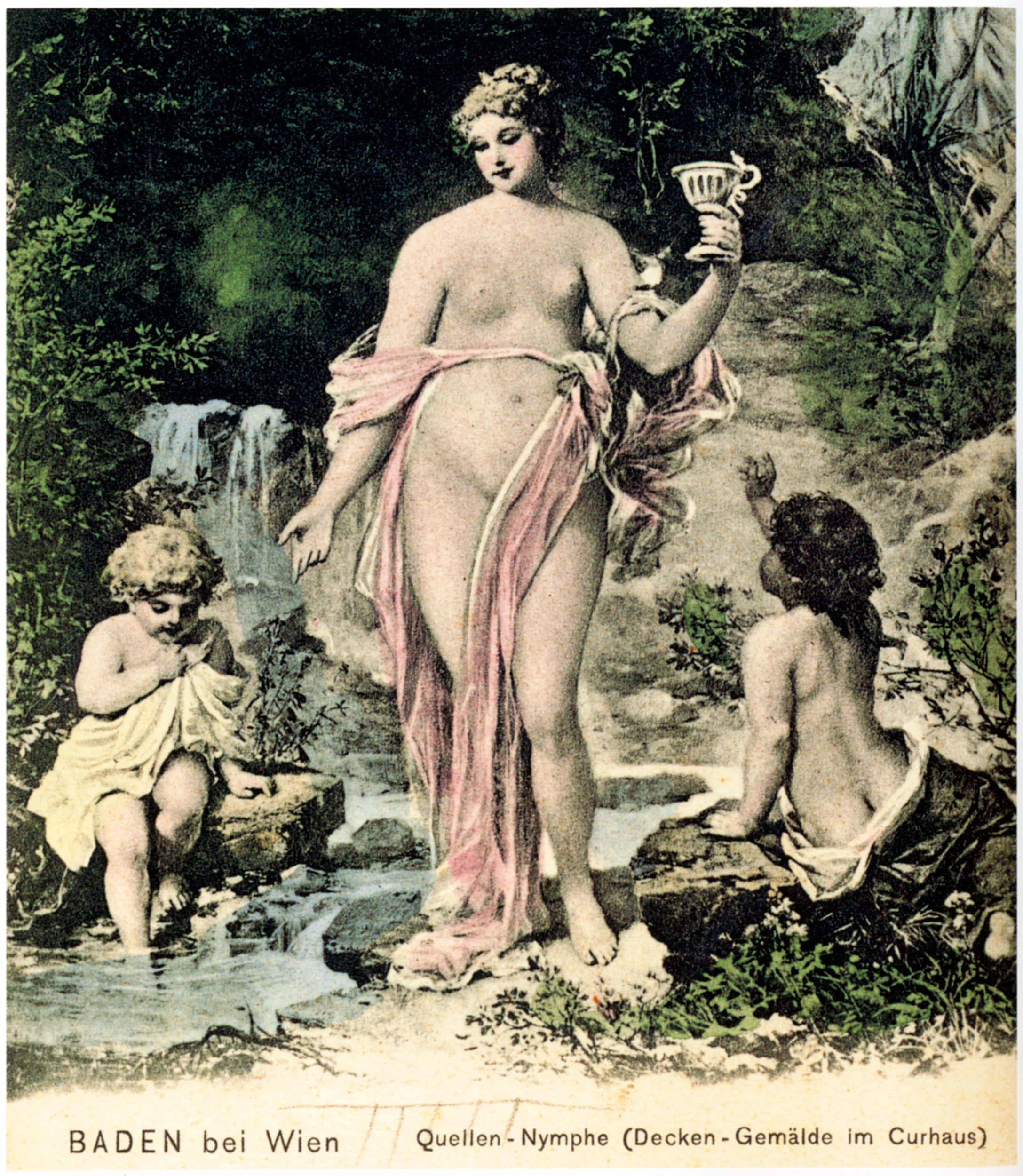 Deckengemälde (1896), Kurhaus in Baden bei Wien, Ansichtskarte (um 1890)